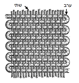 אריגת שתי וערב